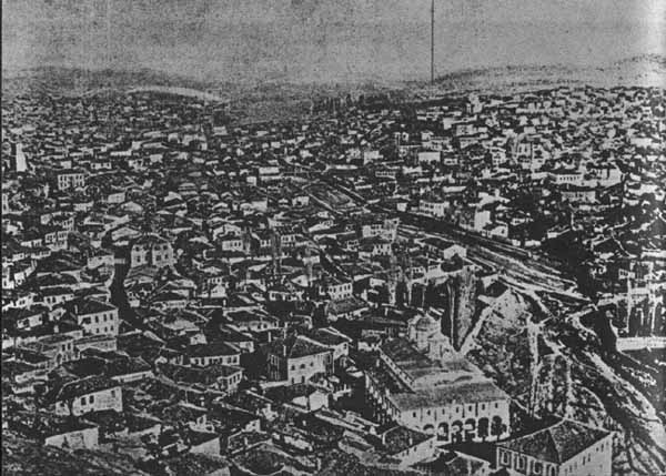 Stip-kraiXIXv.jpg